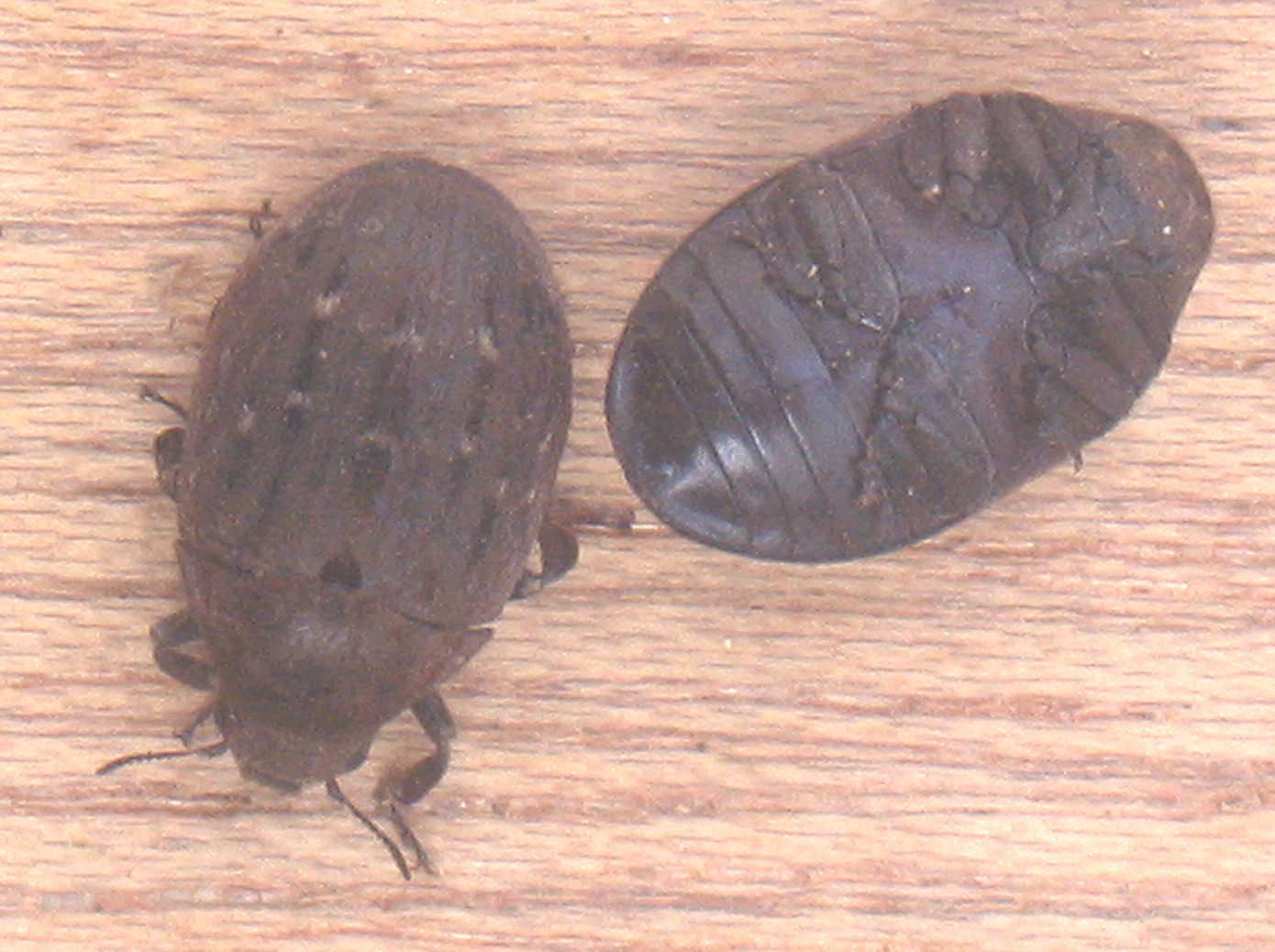 Pilkever) Pill beetle (Byrrhidae sp.